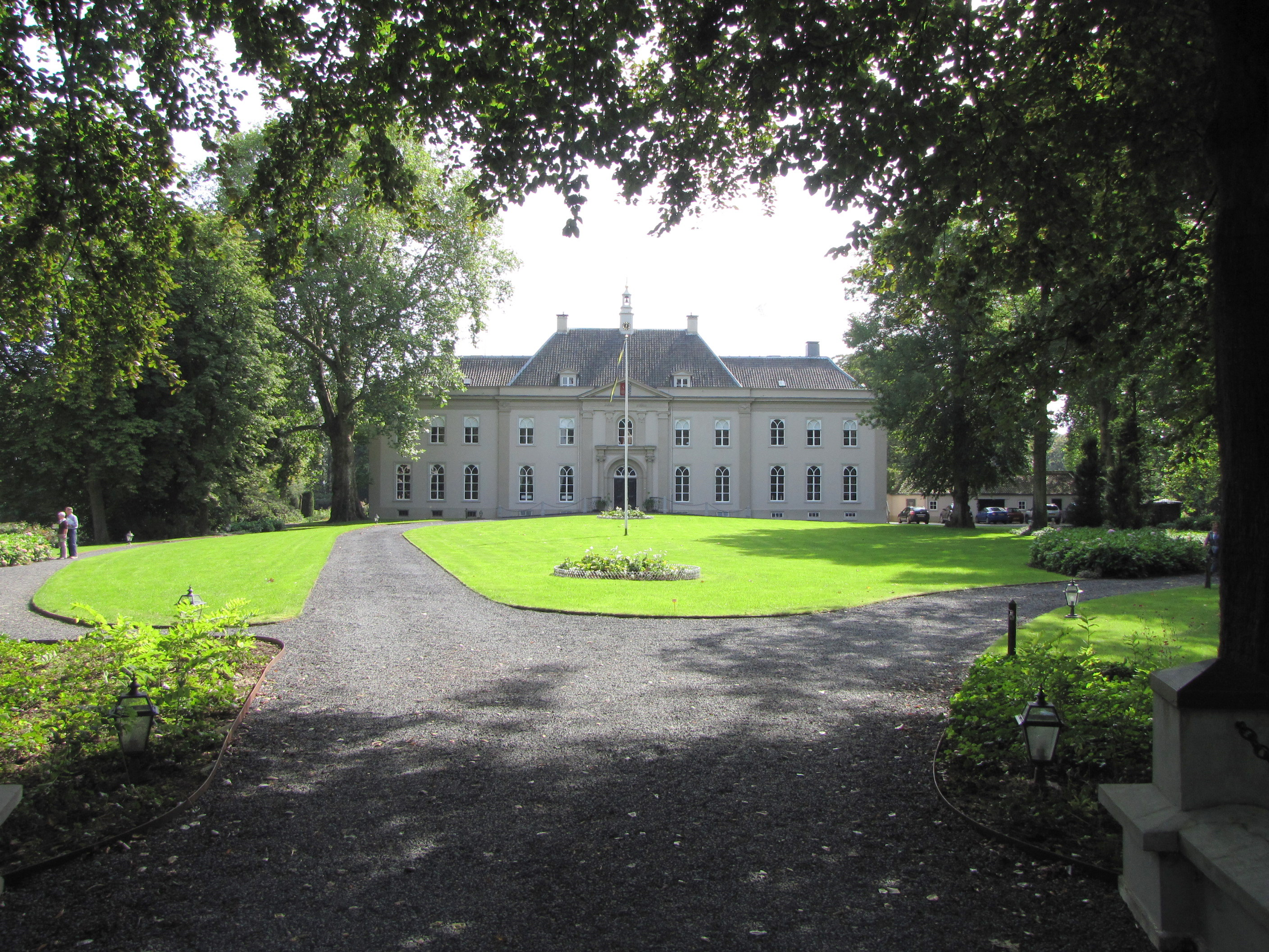 Huis Landfort bij Megchelen, Oude IJsselstreek.